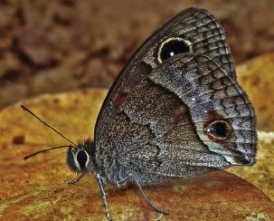 Calisto bruneri